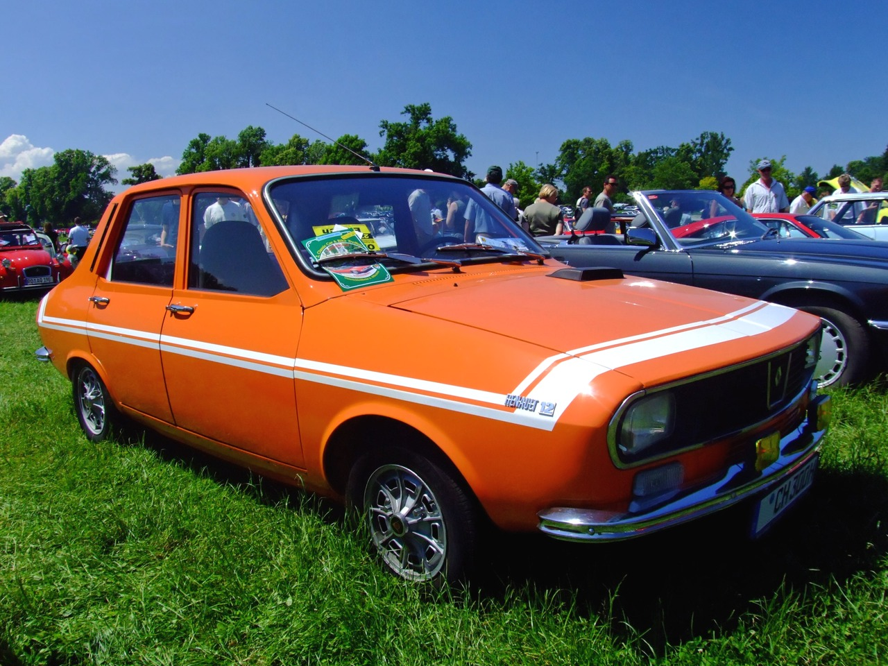 Quelle: selbst fotografiert, 06/2007 Fotograf: Späth Chr.